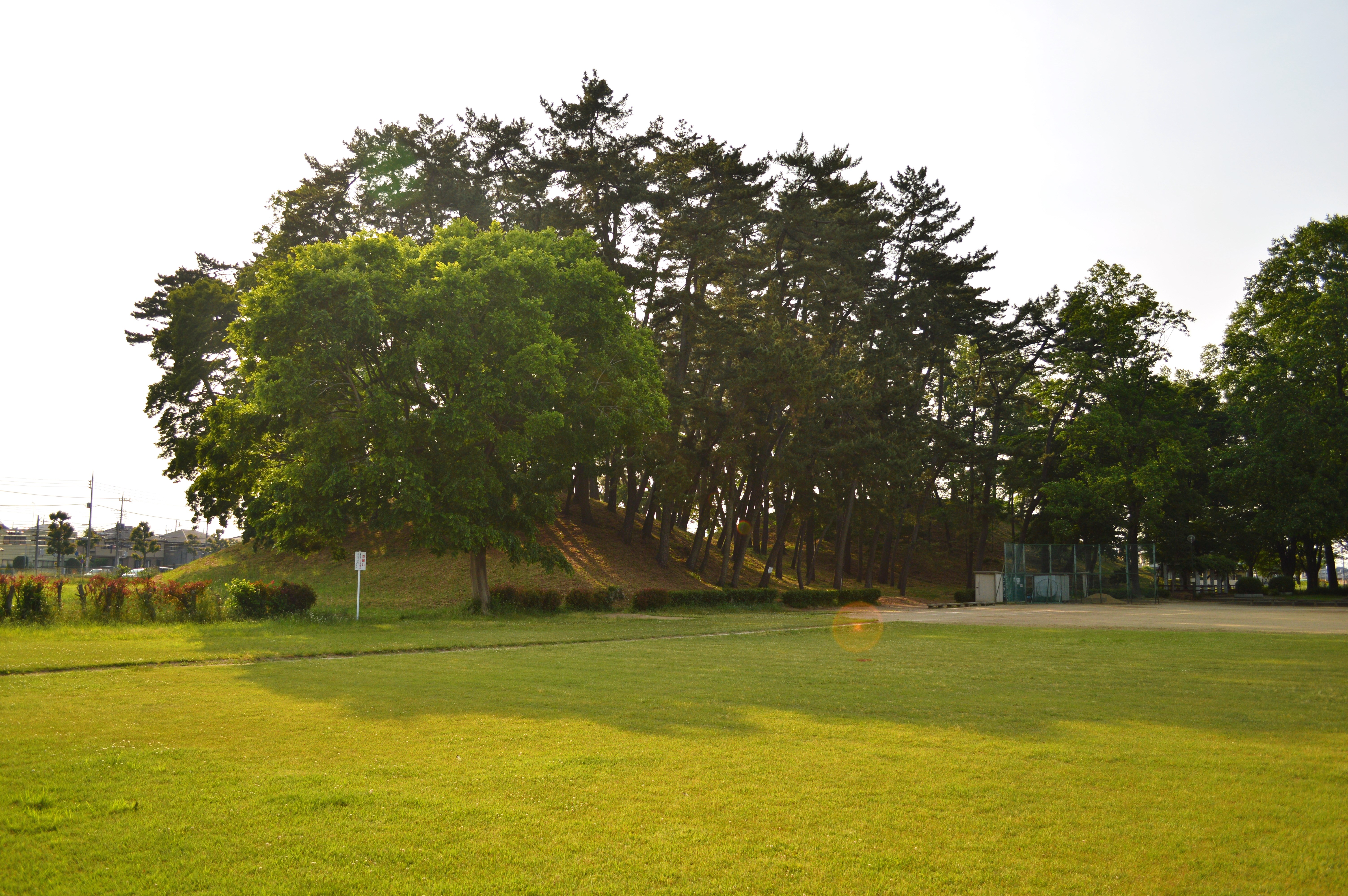 前橋八幡山古墳-2